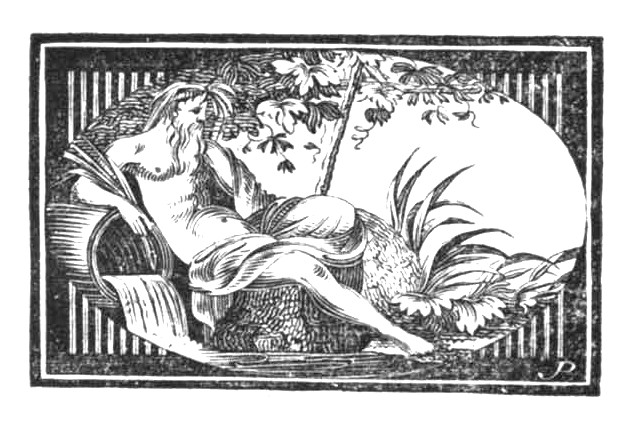 Luise Duttenhofer / Holzschnitt: Johann Wilhelm Gottlieb Pfnor: Cannstatt (1821), schwarzer Scherenschnitt, Eingangsvignette für das Gedicht „Cannstatt“ aus dem Gedichtband „Lautentöne“ von Christian Gottlob Vischer. Der Holzschnitt zeigt in einem querovalen Medaillon den Gott des Neckars, der bei Bad Cannstatt am Flussufer liegt und das Wasser aus einem großen Fass in seinen Strom fließen lässt. Der Flussgott ist als älterer Mann mit ernstem Gesicht, einem klassischen Profil, einem langen, wallenden Bart und mit einem wohlerhaltenen muskulösen Körper dargestellt. Er ist nackt bis auf die Scham, die ein Tuch bedeckt. Das wilde Haupthaar wird durch ein Band gebändigt, das in einem Schirm aus Lorbeerblättern endet. Im rechten Arm, den er auf das Fass lehnt, hält der Gott ein Bündel Schilfblätter als Szepter. Er ruht inmitten einer idyllischen Schilf- und Blumenlandschaft und über seinem Haupt winden sich wie ein schützendes Schattendach an einem Rebstock die Weinreben des fruchtbaren Neckartals.